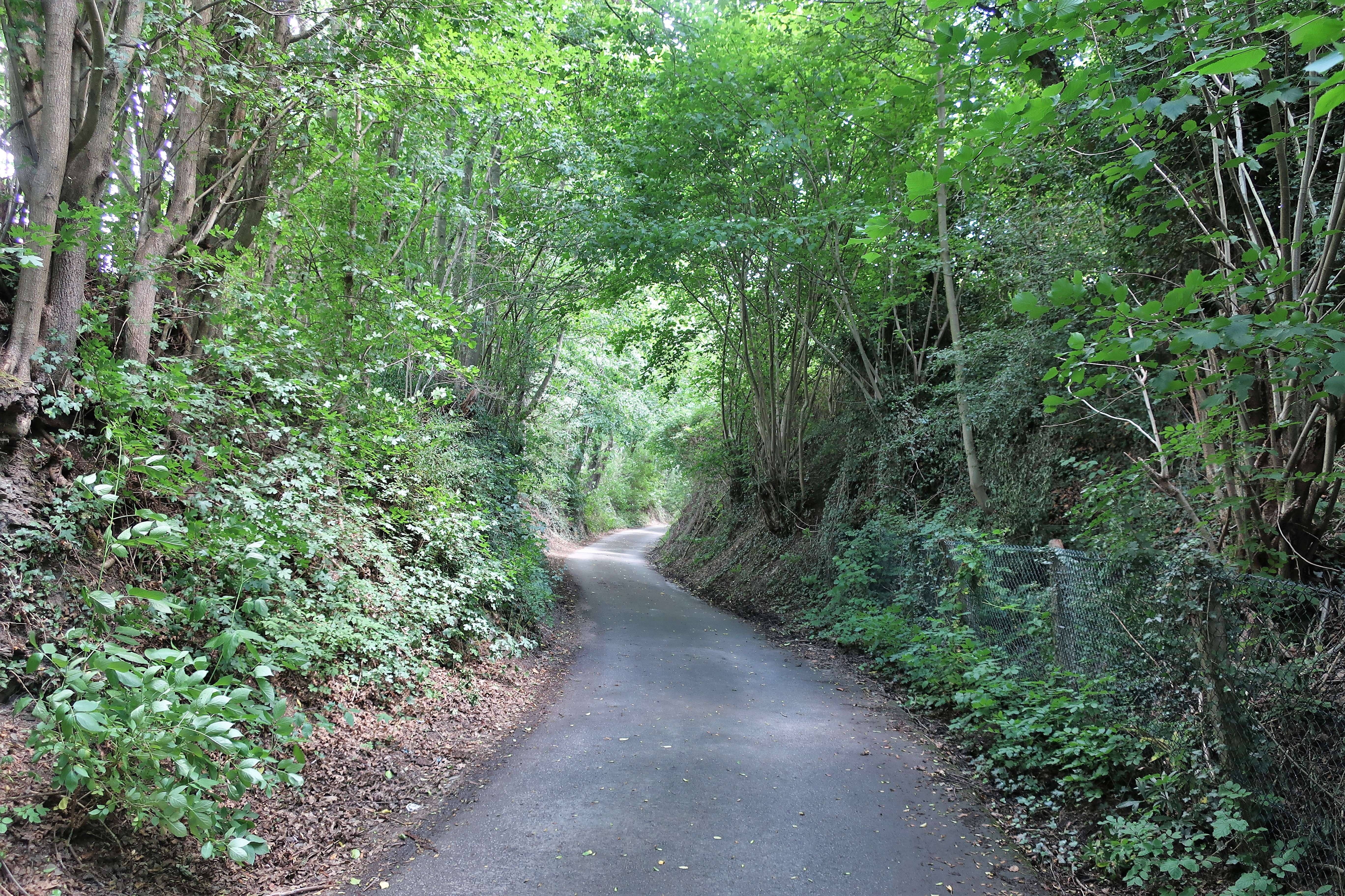 Geschützter Landschaftsbestandteil 1.4.2.40 „Hohlweg am Kronocken“ in Hagen-Hohenlimburg.